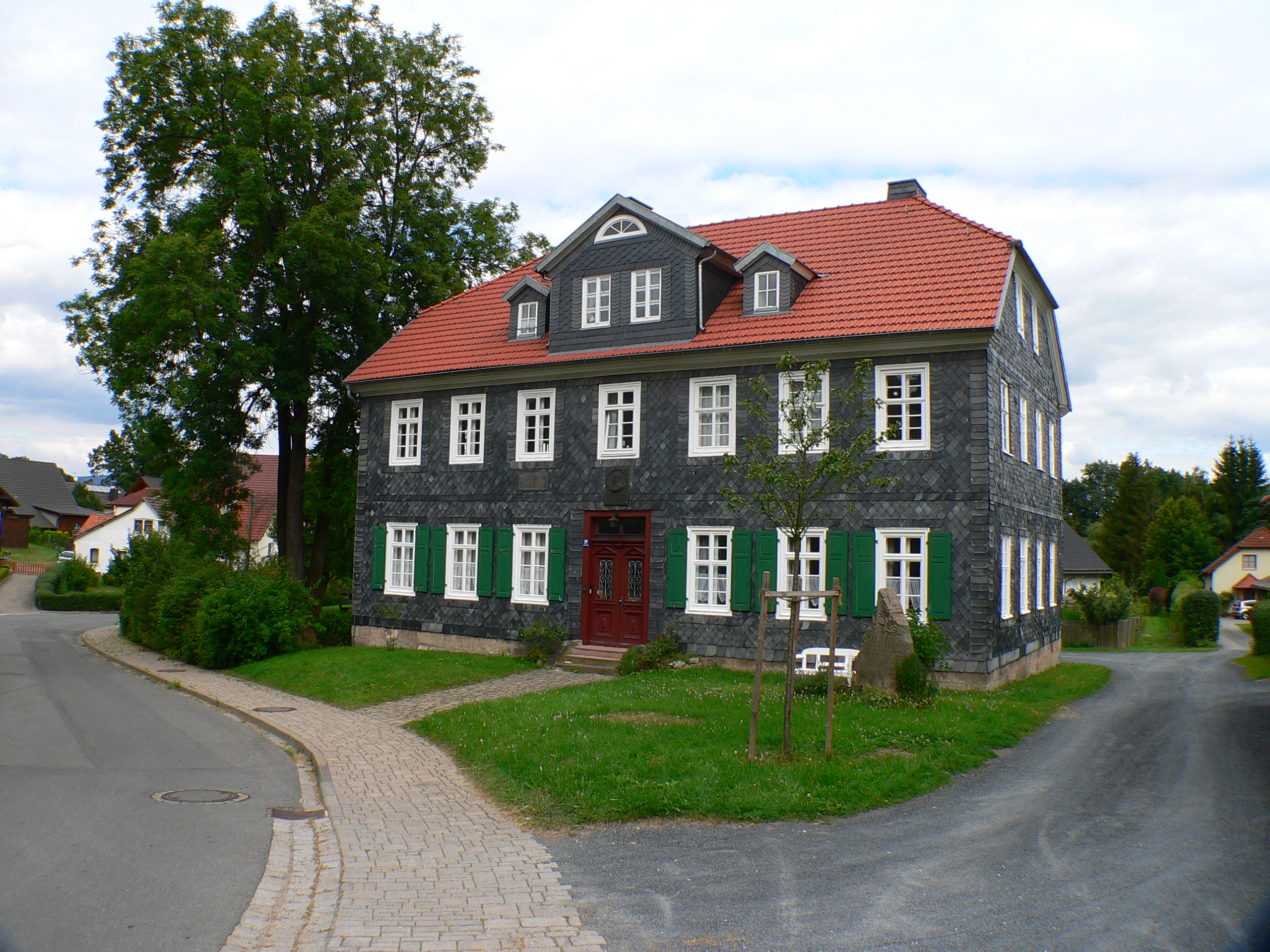 Alte Schule in Rödental-Weißenbrunn vorm Wald, Bayern, Deutschland